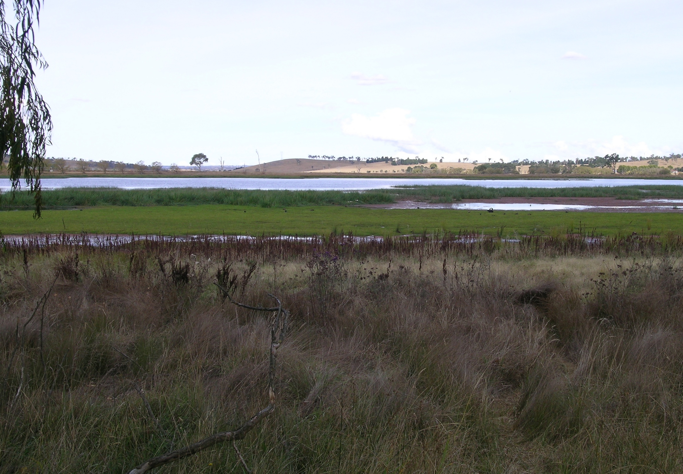 Dangars Lagoon, Uralla, NSW